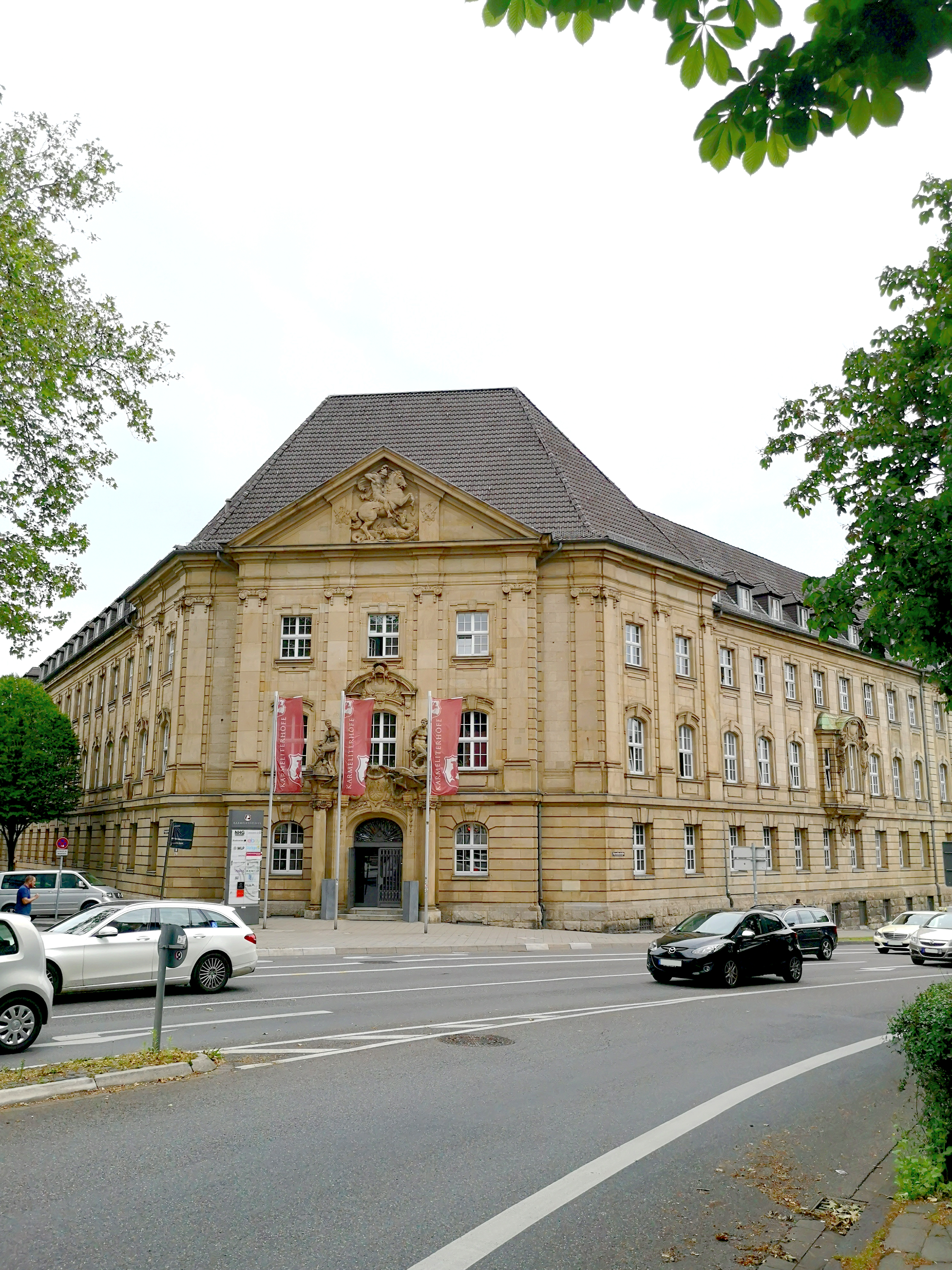 Der Haupteingang der Karmeliterhöfe